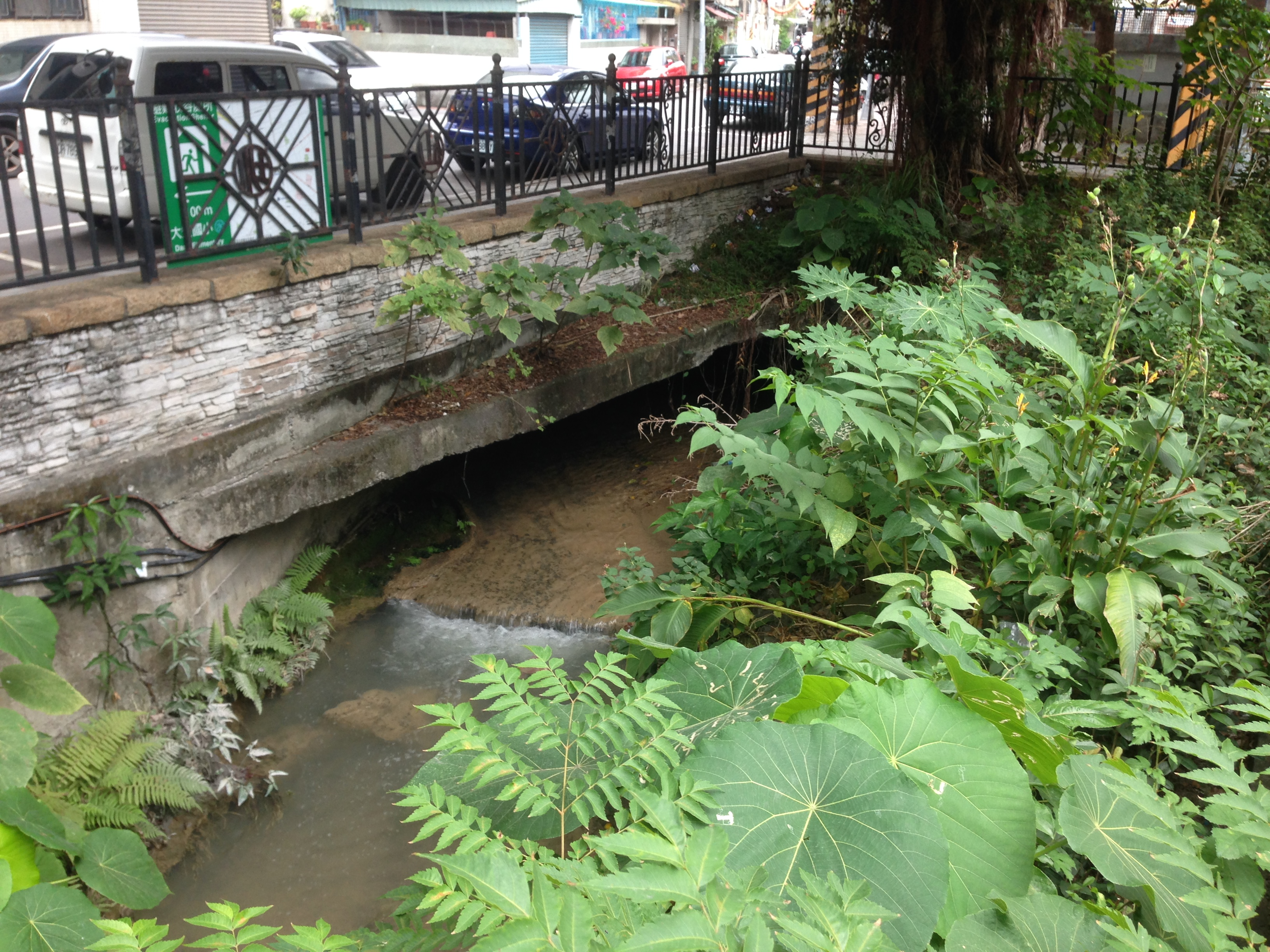 八仙圳一景